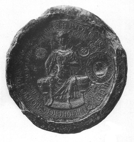 II. András magyar király pecsétje, 1224